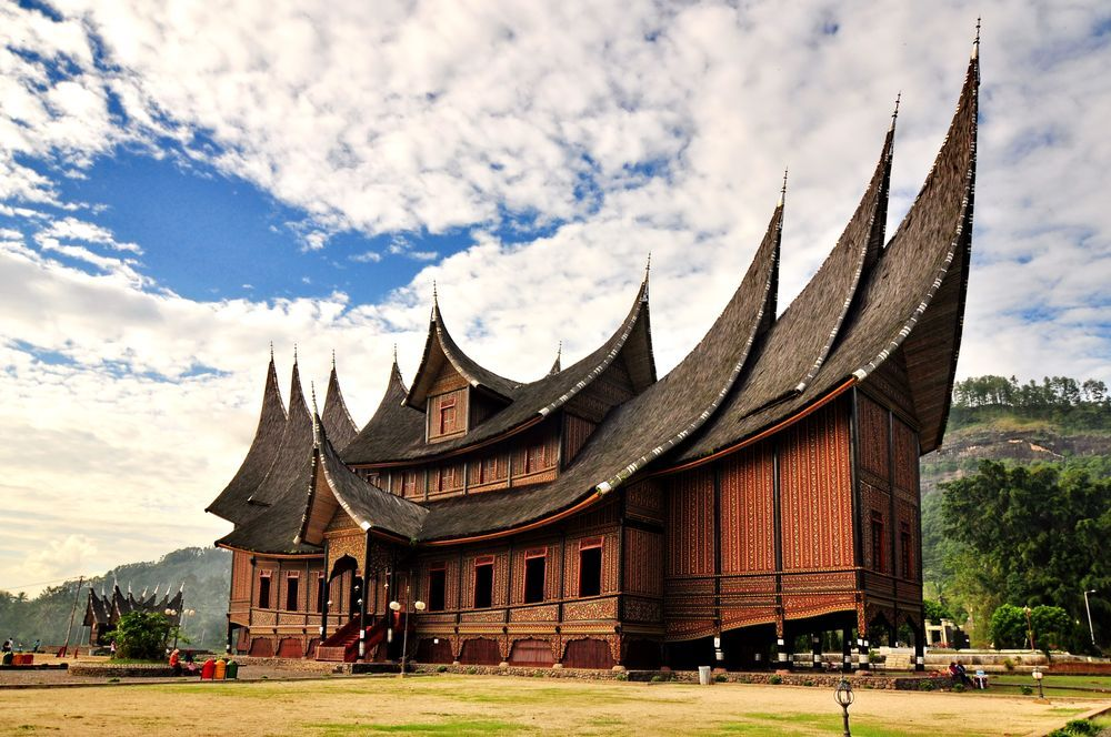 Istana Pagaruyung sudut